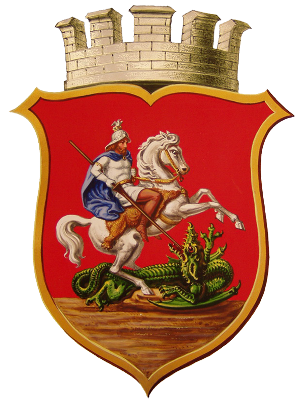 znak - Jiříkov (okr. Děčín)